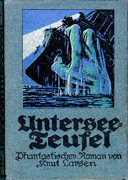 UNTERSEE-TEUFEL. PHANTASTISCHER ROMAN VON KNUT LARSEN.- RADEBEUL BEI DRESDEN UND LEIPZIG: HAUPT & HAMMON. o.J.(1918). 349 SS., 1 Bl., Hlwd mit illustriertem Schutzumschlag. (Roman aus dem Nachlass)